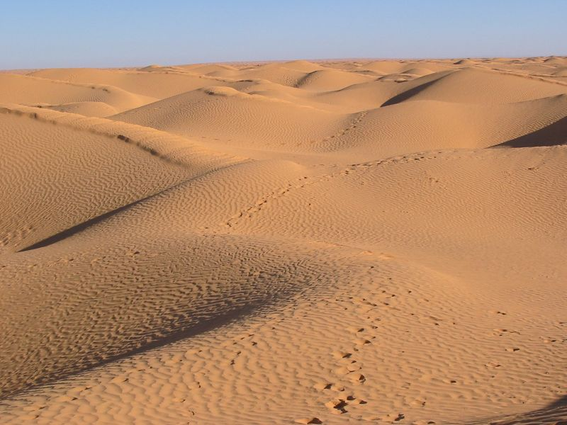 photographie personnelle prise en décembre 2004 représentant des dunes du Grand erg oriental dans le Sahara tunisien près de Ksar Ghilane.